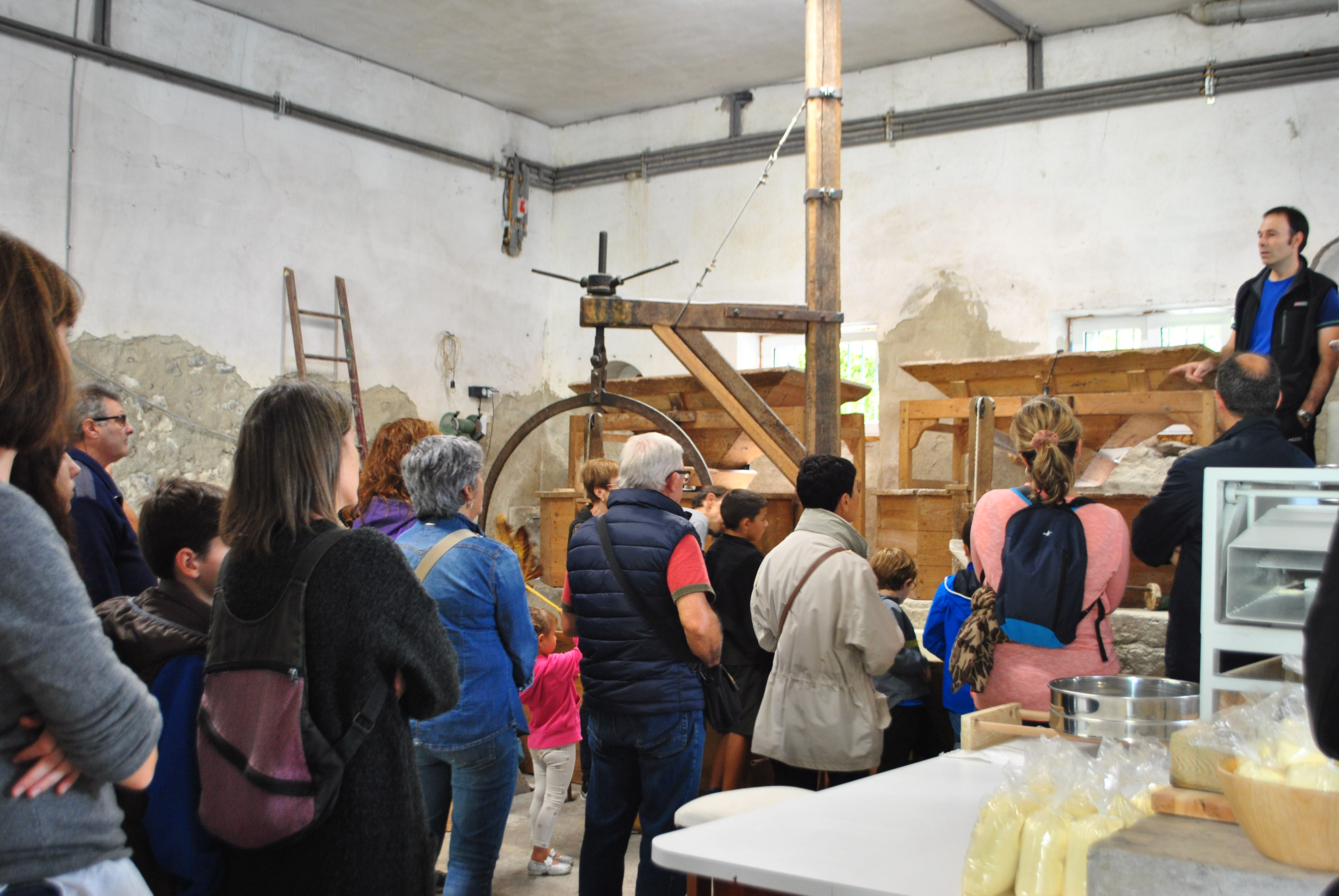 Urriaren 5ean, Ondarearen Europar Jardunaldien barruan, herritar ugari inguratu dira Yurrita errotara. Ondarea Plazara !!